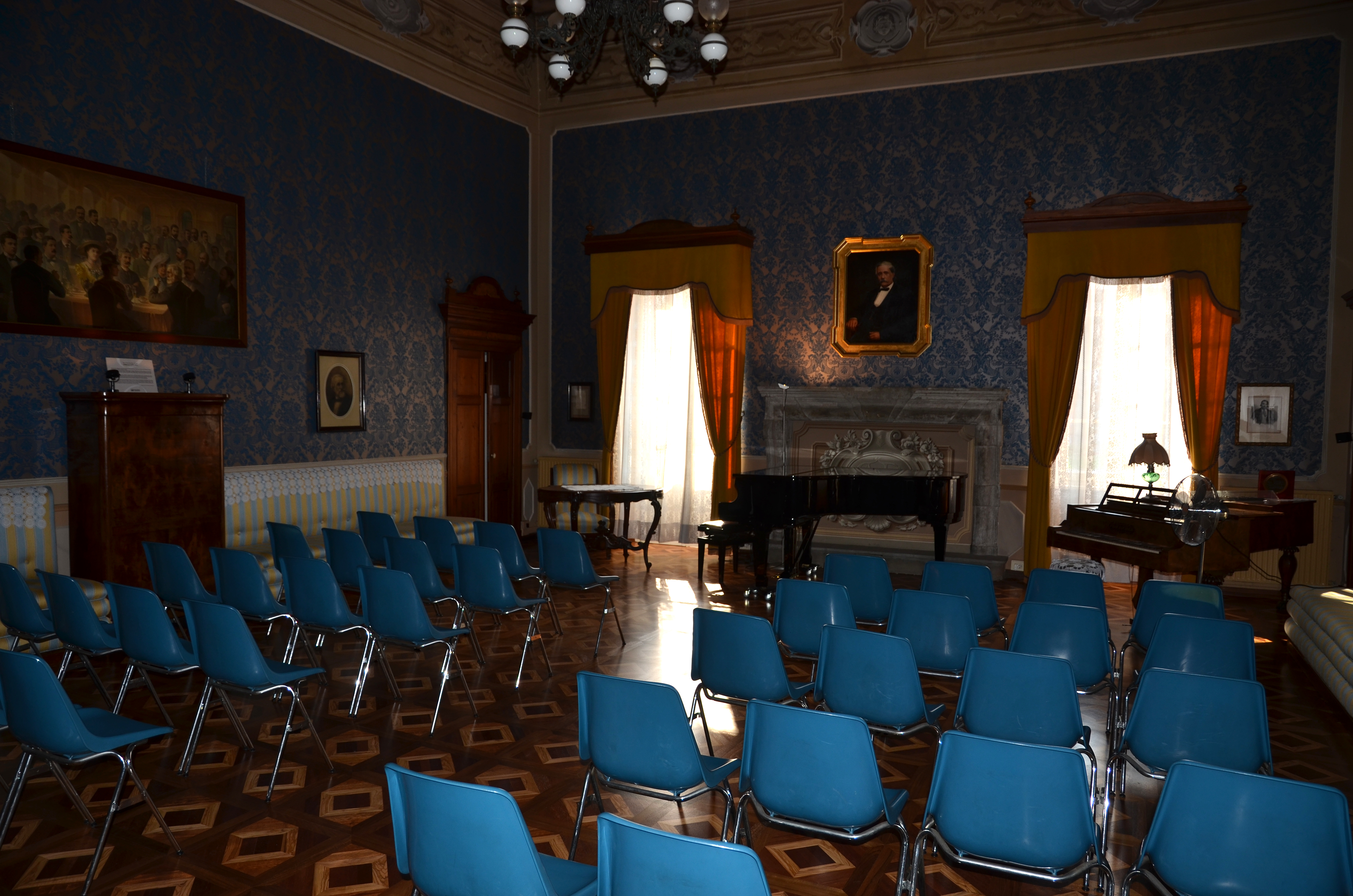 Dům Antonia Barezzi, Busseto - Itálie